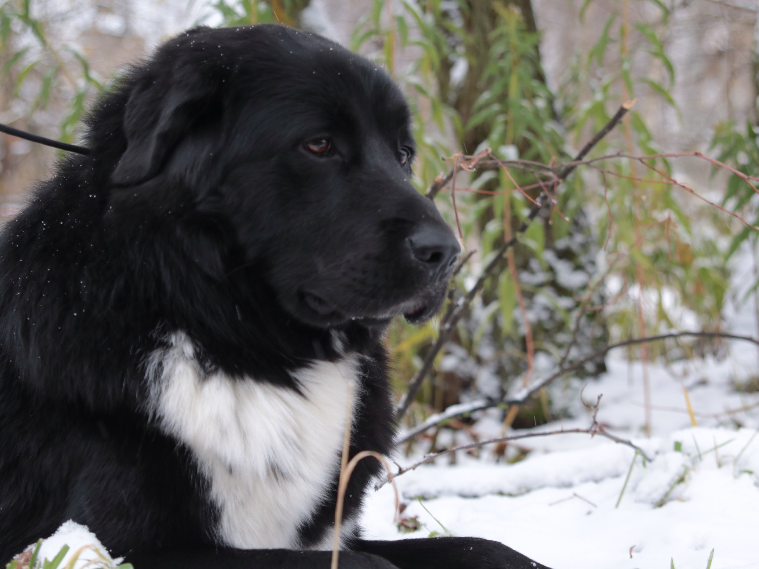 Дух Дайынчы Монгун - молодой кобель тувинской овчарки. Владелец Шафеева Я. Г.